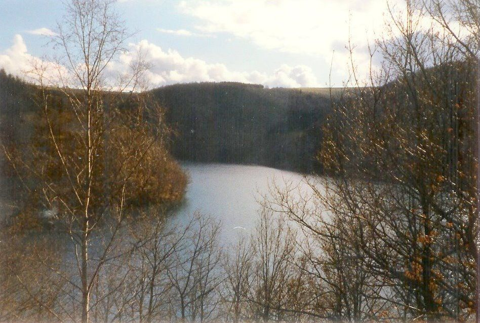 Riveristalsperre